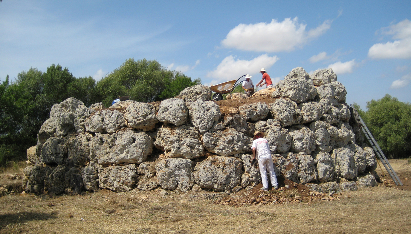 Talaiot de Son Fred (Sencelles)